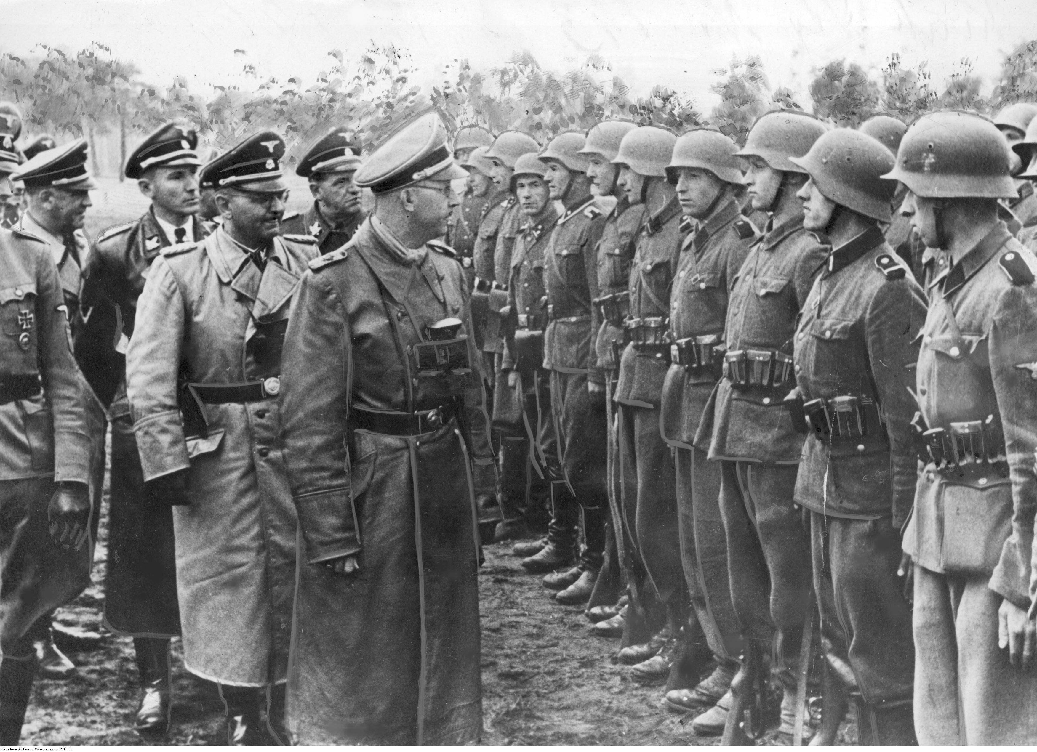 Reichsfuhrer Heinrich Himmler (na pierwszym planie) w towarzystwie niemieckich oficerów przed oddziałem 14. Dywizji Grenadierów Waffen SS "Galizien". Wśród funkcjonariuszy widoczny Otto von Wachter.